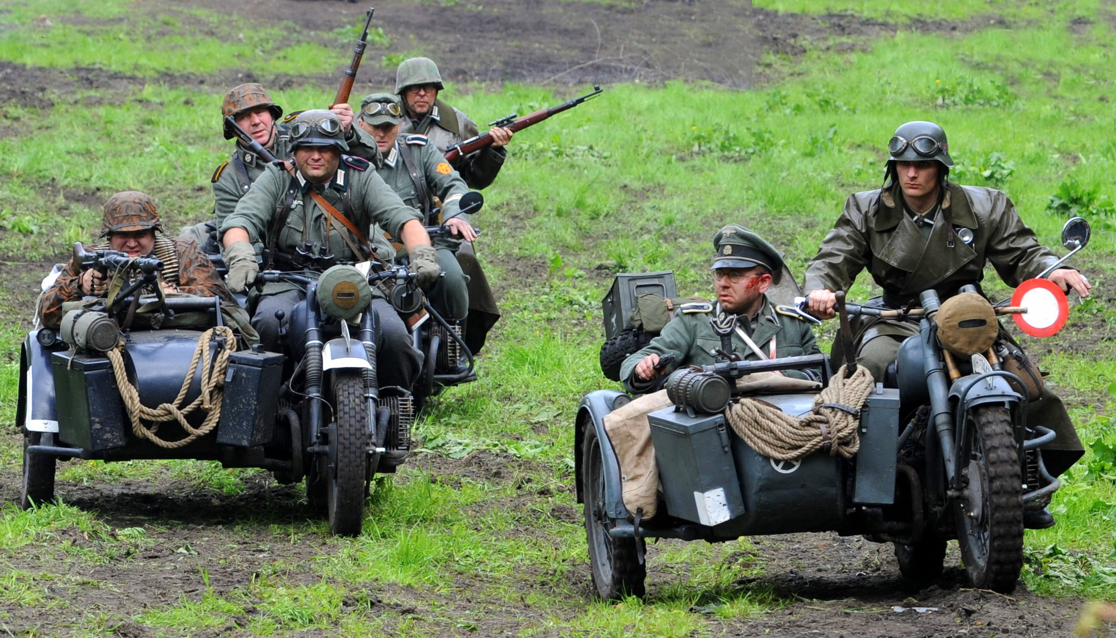 Rekonstrukcja Bitwy o Berlin z 1945 roku na terenie Twierdzy Modlin